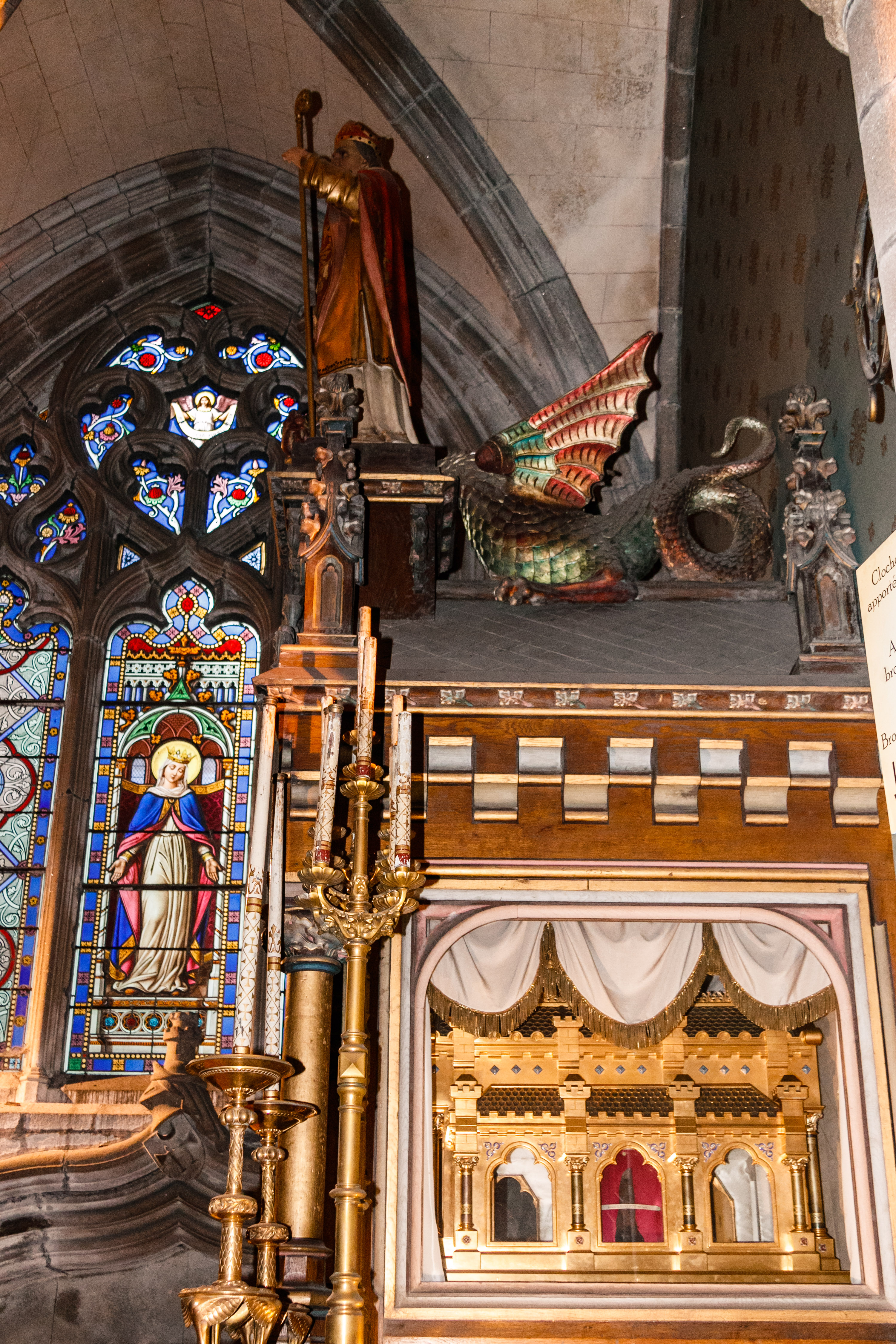 Autel abritant les reliques de Saint Pol Aurélien, dans un reliquaire d'orfèvrerie contenant le chef, un os du bras et un doigt du saint patron saint Pol Aurélien.